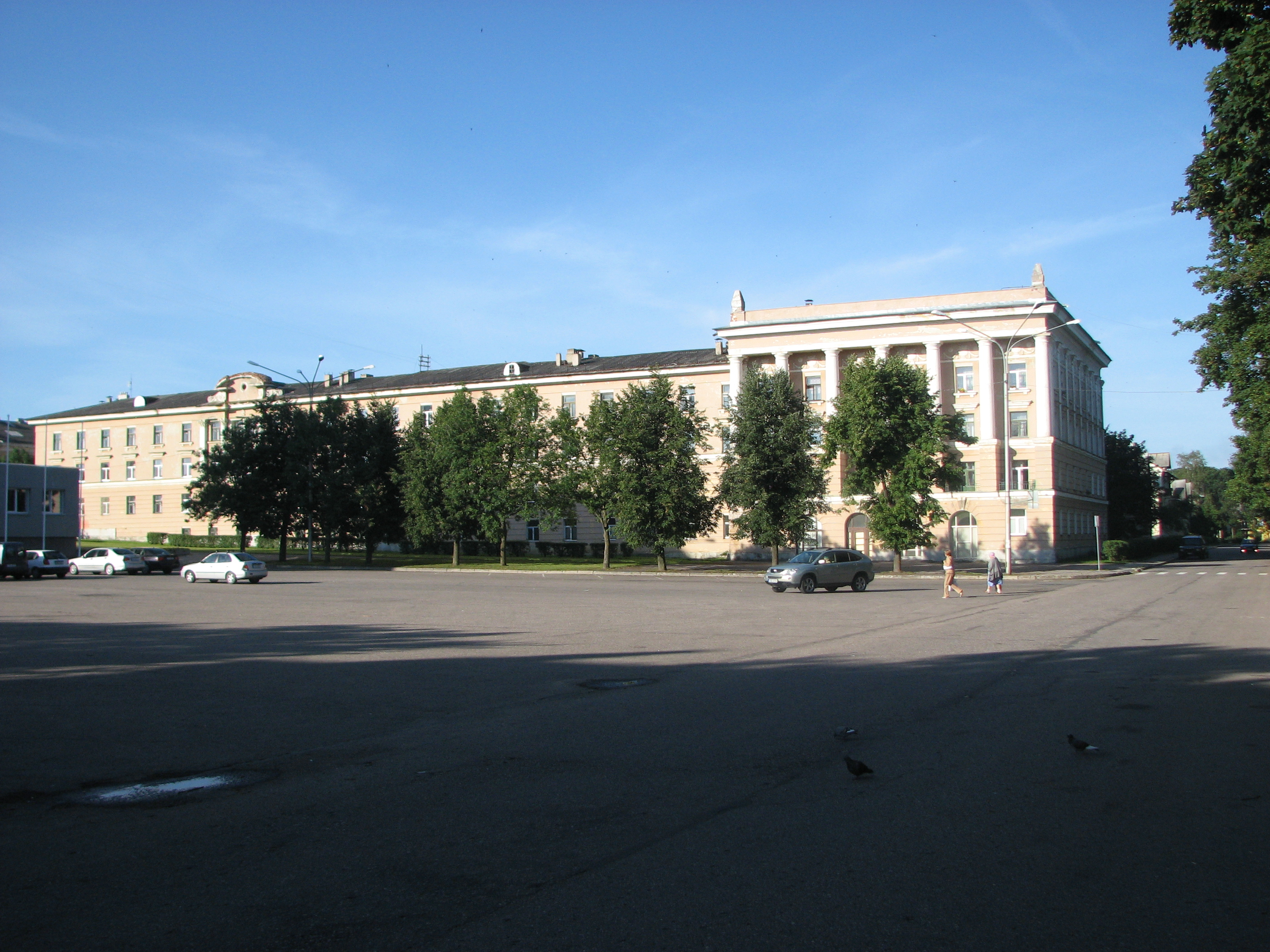 Kohtla-Järve